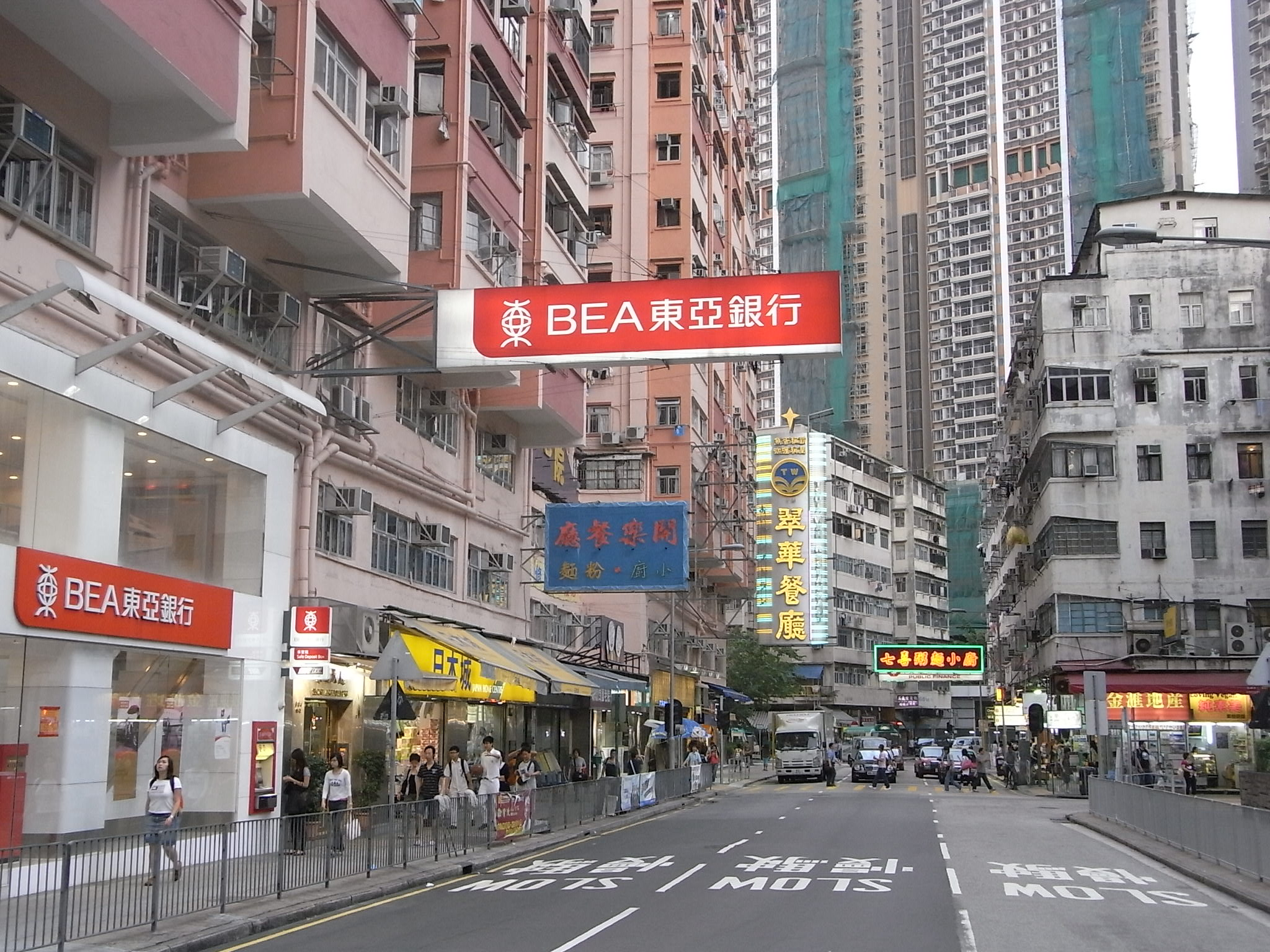 新蒲崗崇齡街崇齡大廈東亞銀行分行